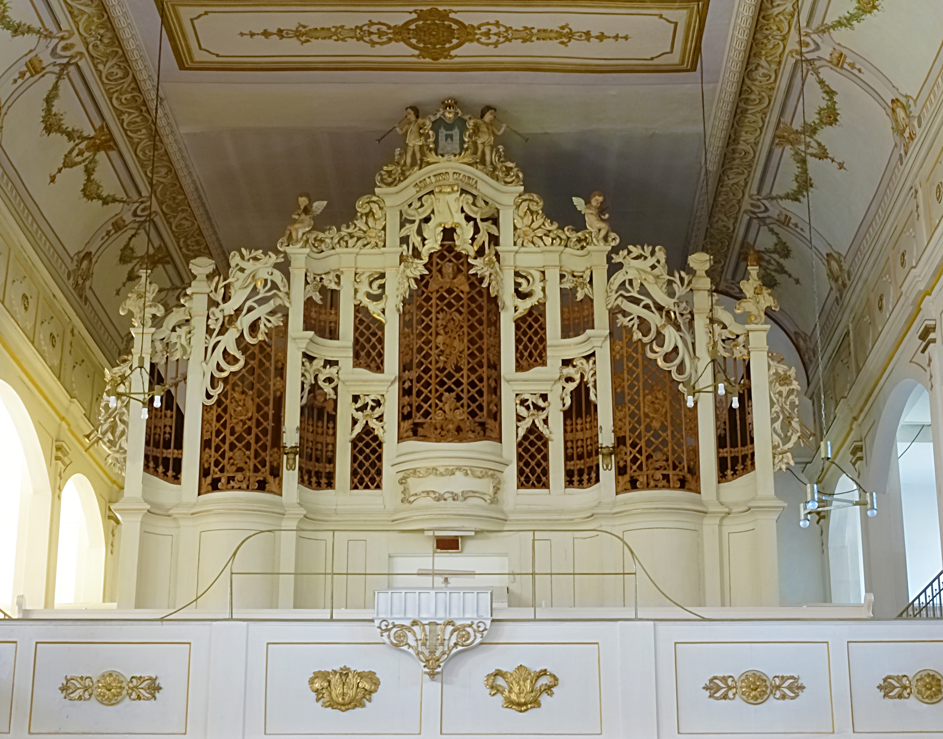 Orgel von Adam Eifert (1898) in der Stadtkirche St. Marien Stadtilm unter Verwendung des barocken Prospekts und Teilen der Schulze-Orgel von 1785. Eine Besonderheit ist, dass im Prospekt ein Schmuckgitter konzipiert wurde.[1]